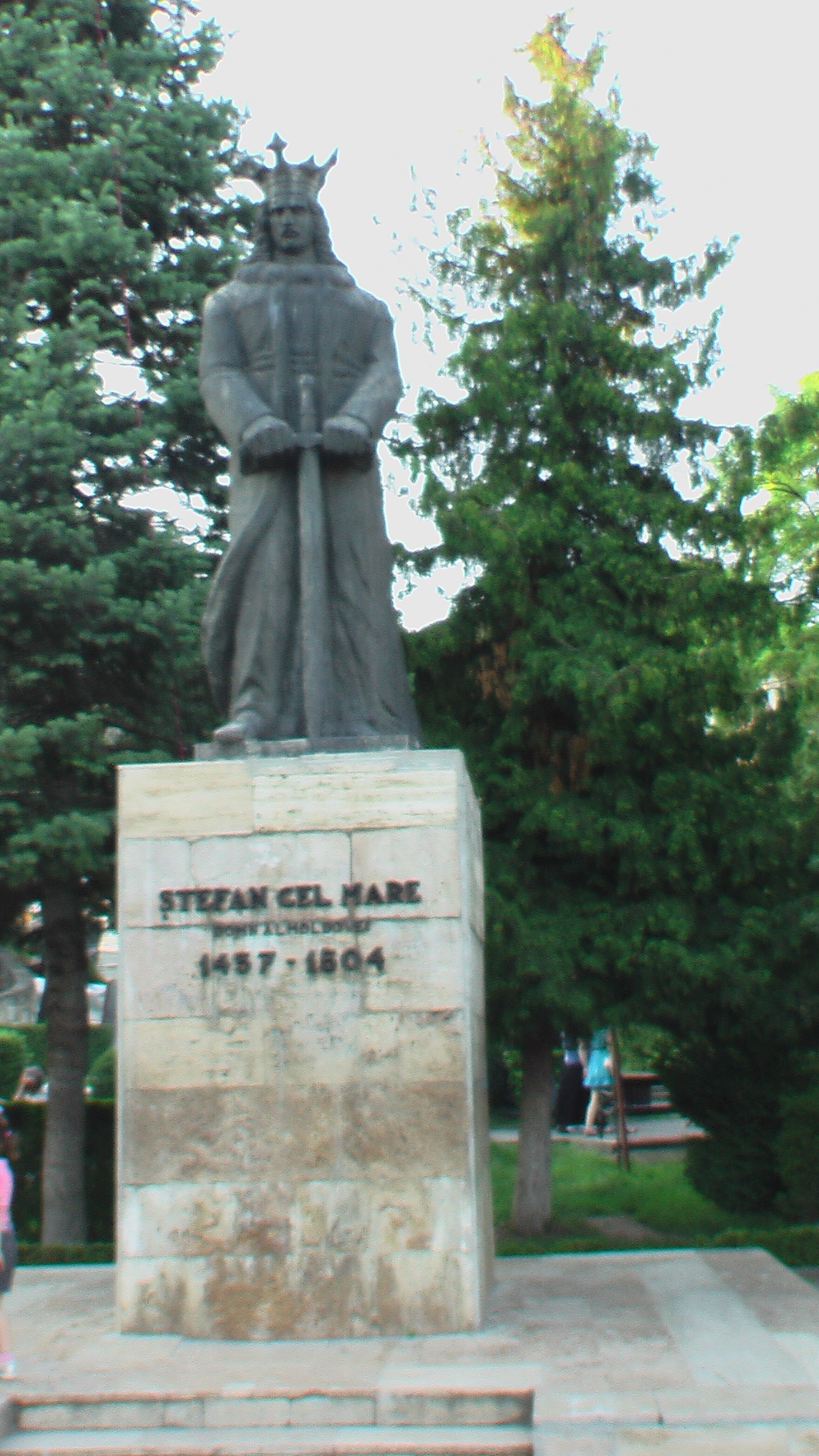 StefanCelMarePiatraNeamt